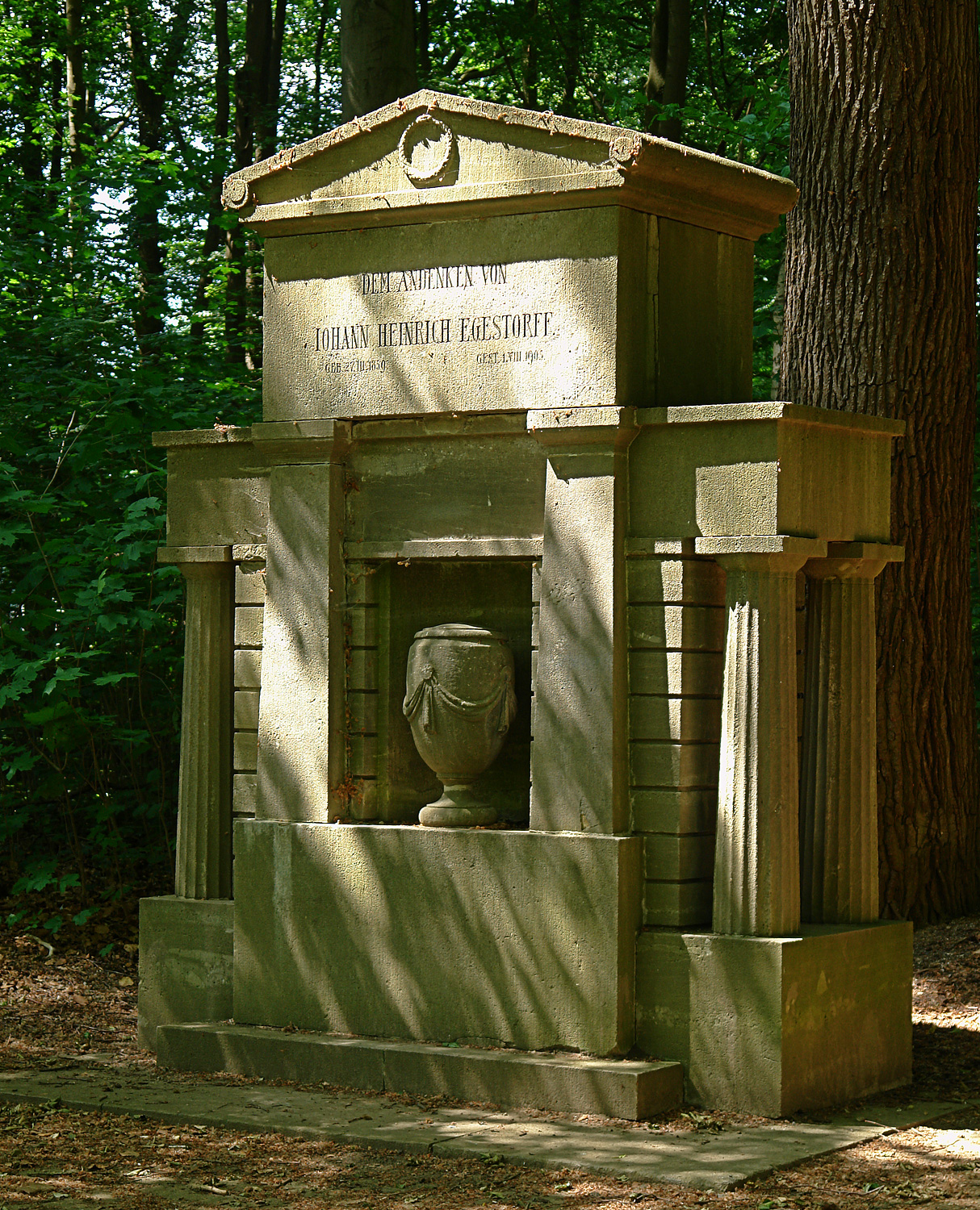 Egestorff-Stiftung in Bremen: Urnengrab von Johann Heinrich Egestorff (* 27. März 1859; † 1. August 1905) im Park an der Eichenallee